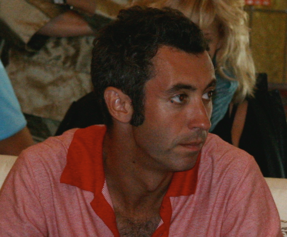 Luca e Paolo al Festival Gaber 2008.